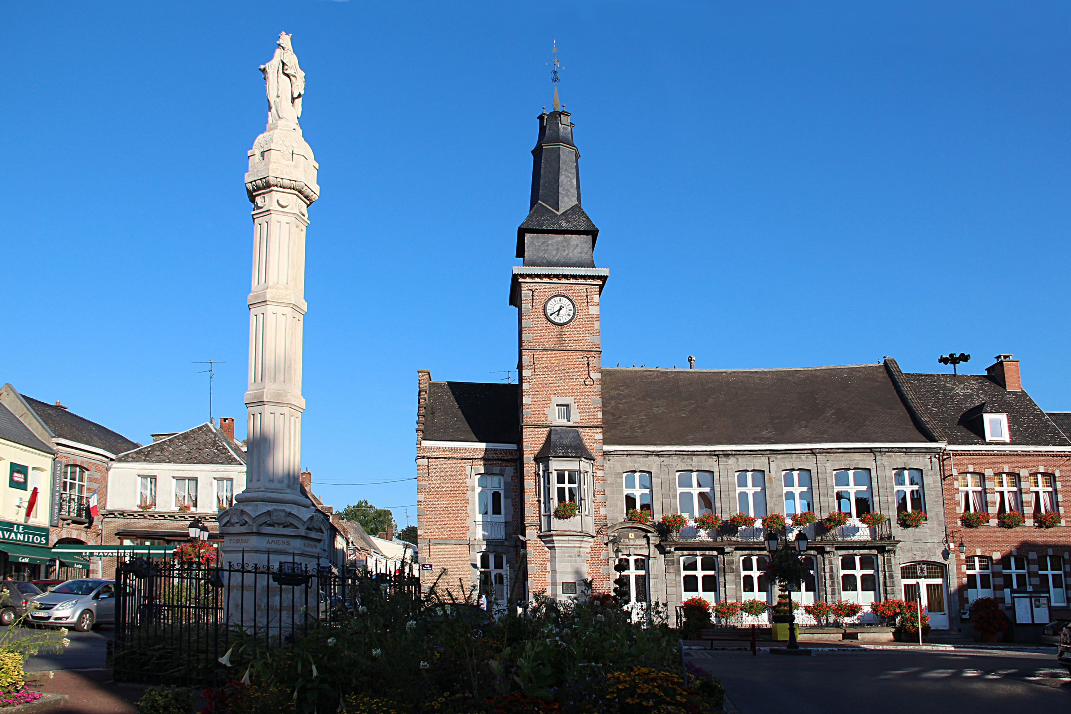 La colonne Brunehaut et l’hôtel de ville Bavay (département du Nord, France).